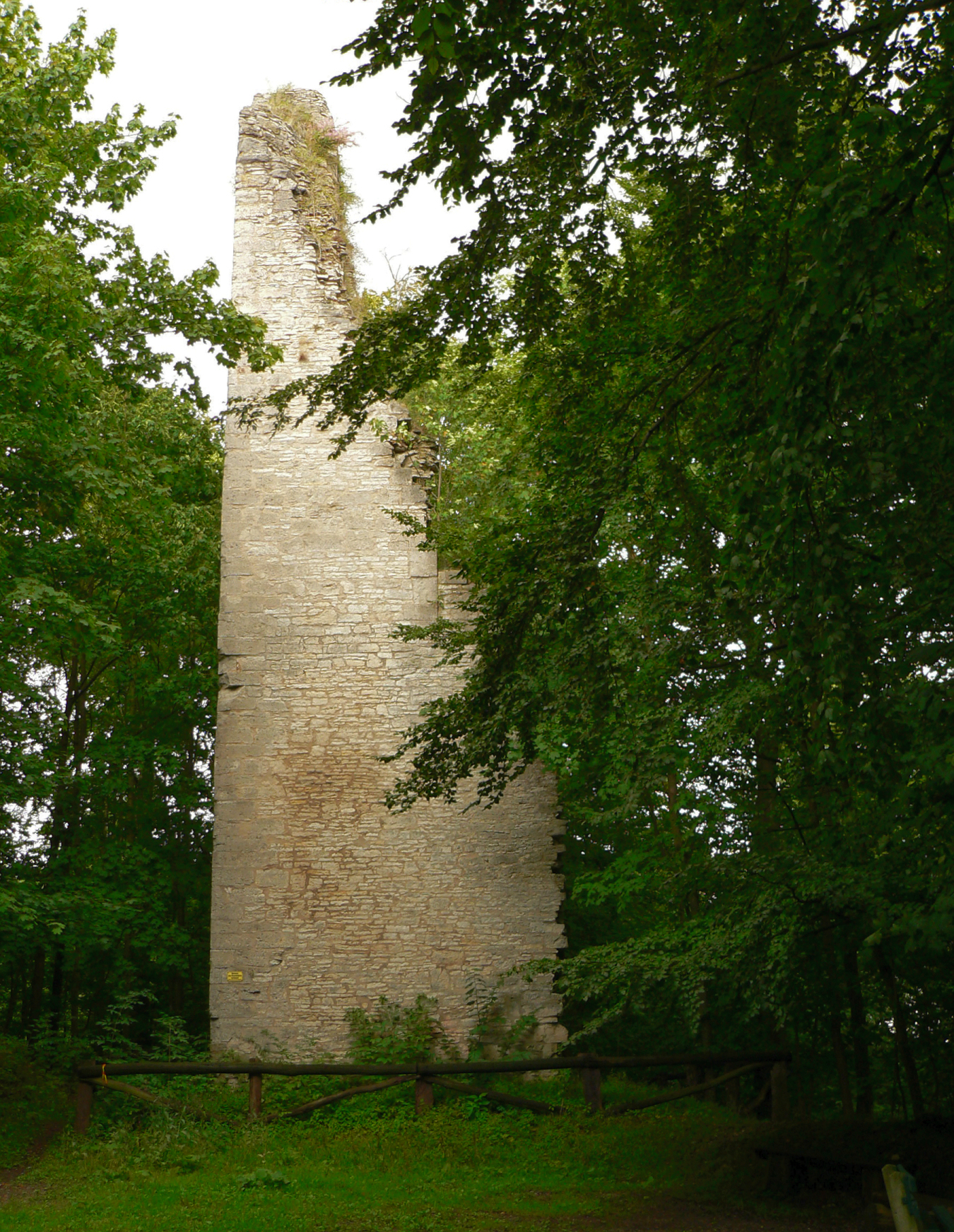 Bergfried Burg Wohlenstein